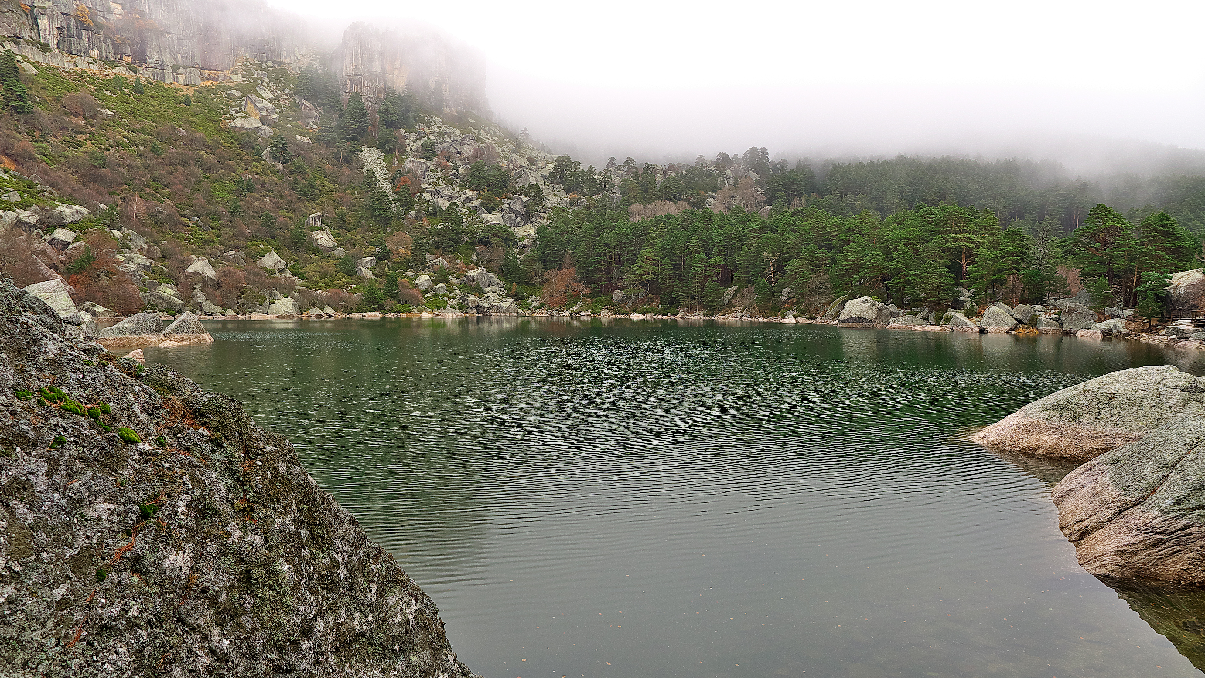 Laguna de origen glaciar a mas de mil setecientos metros de altitud.